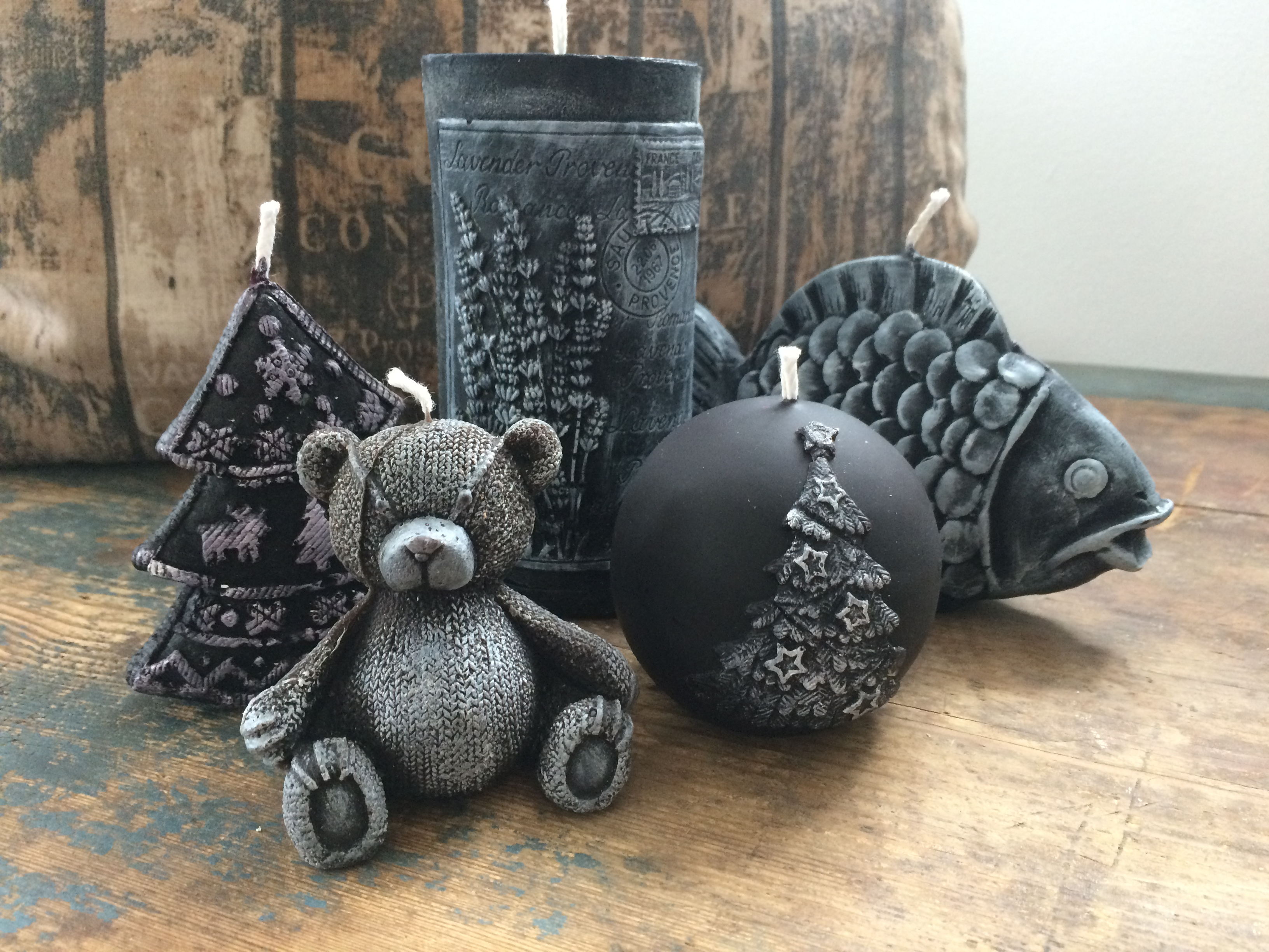 Vyrábějí svíčky ze včelího vosku v netradičních barvách. Třeba tuto B&W řadu